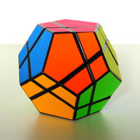 Skewb Ultimate puzzle